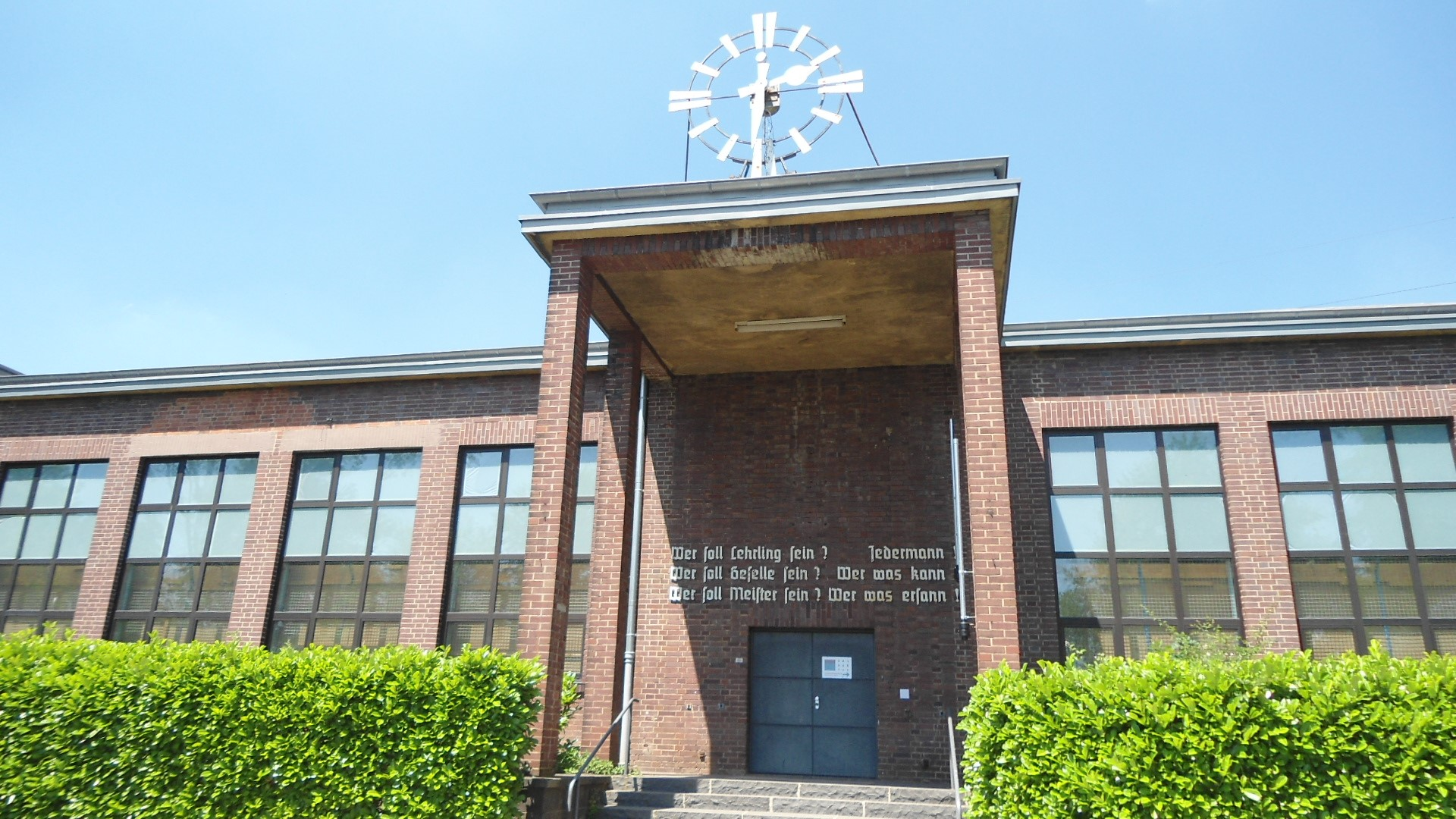 Das Ausbesserungswerk Saarbrücken-Burbach